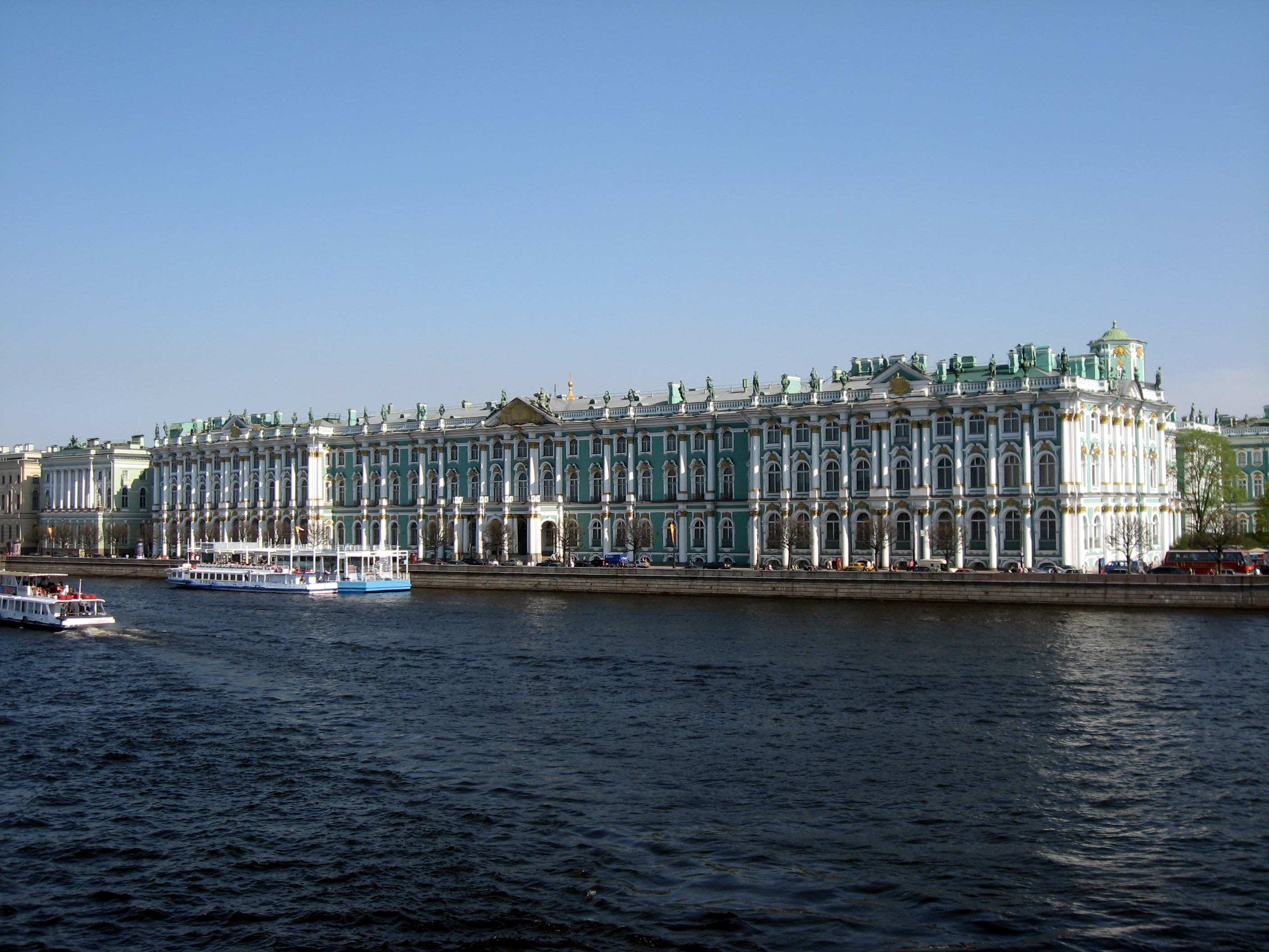 Sankt-Petěrburg, Zimní palác